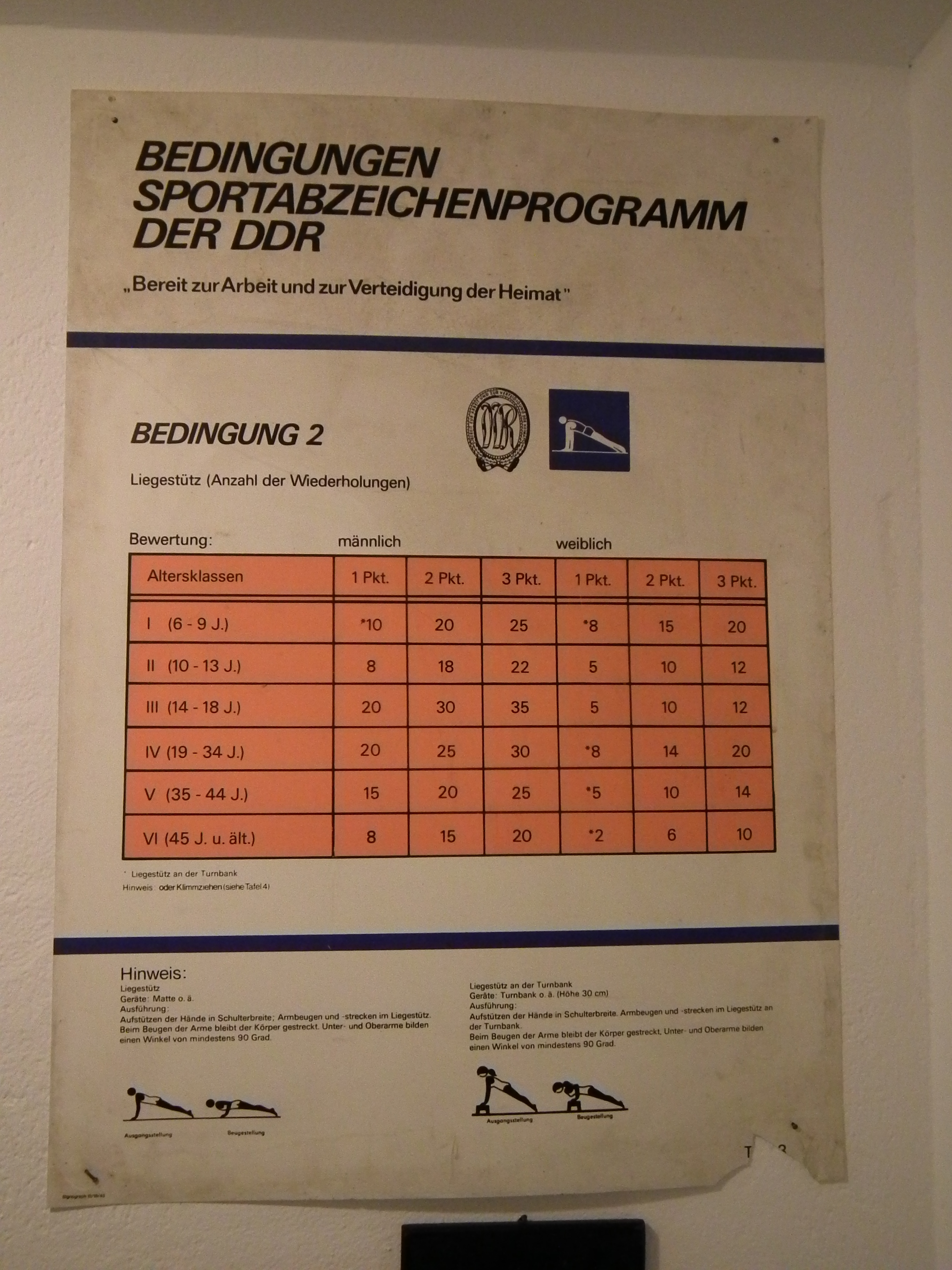 N’Ostalgiemuseum Leipzig